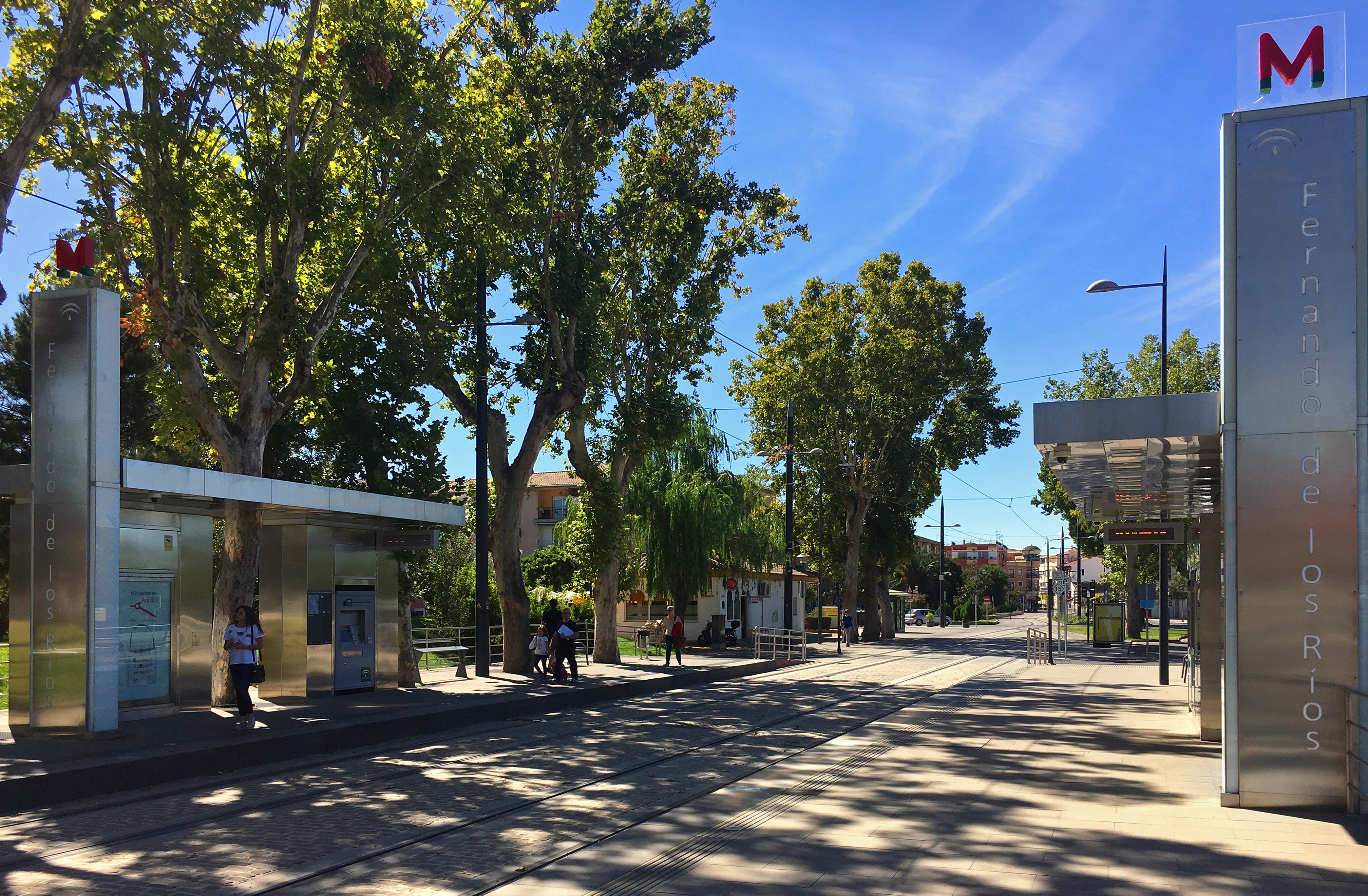 Estación de Fernando de los Ríos del Metro de Granada, situada en el municipio de Armilla.